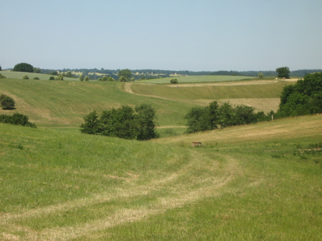 Endmoränenlandschaft bei Schlockow (Gemeinde Warnow, Landkreis Güstrow, Mecklenburg).